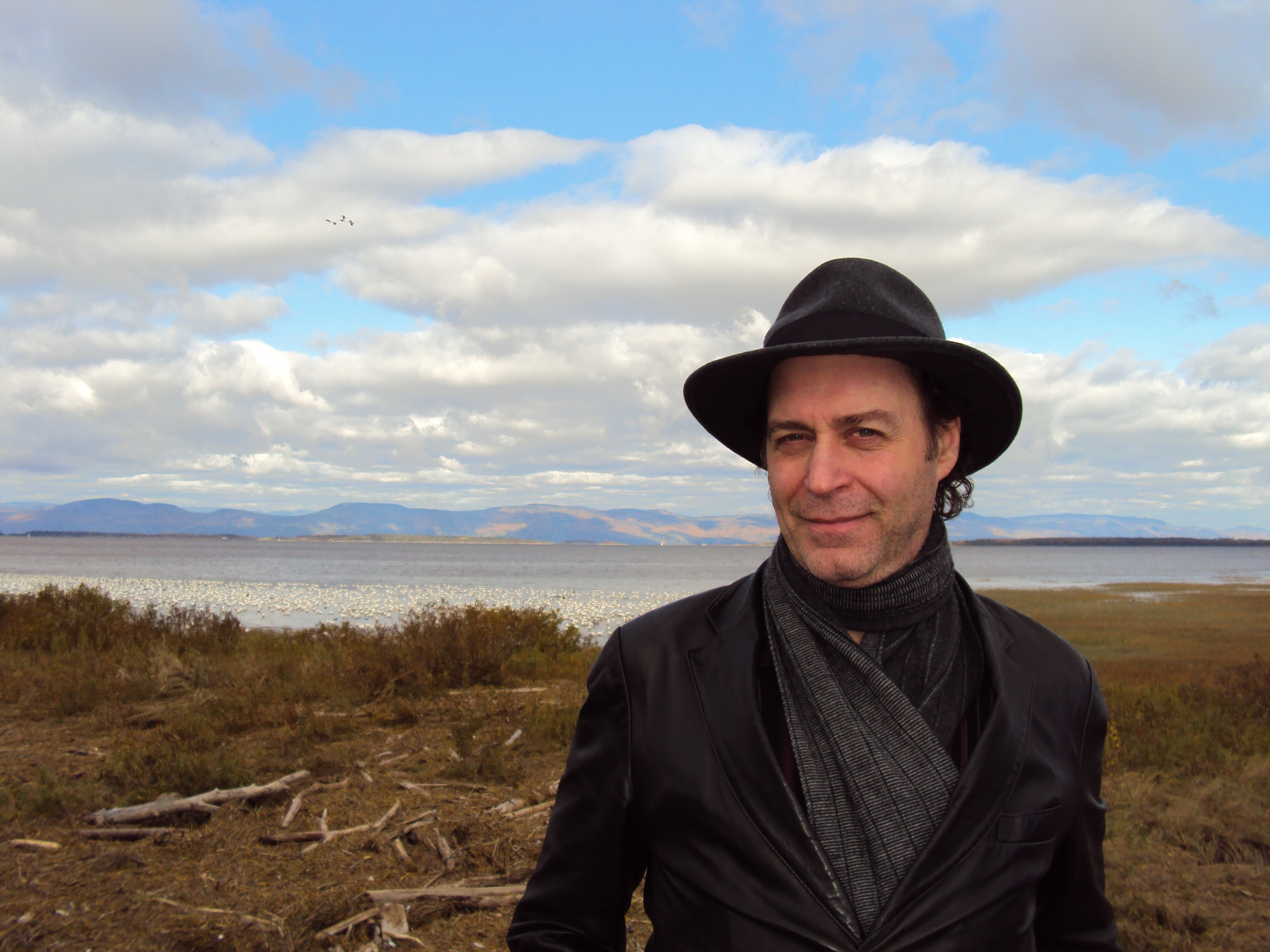 Pierre Anctil, 2009.